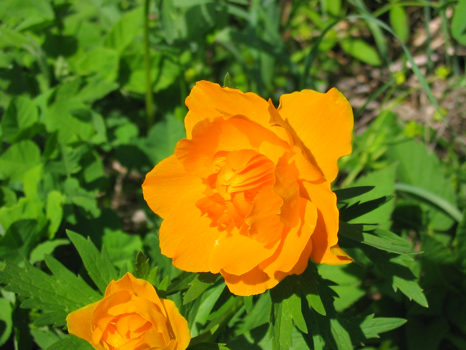 Лютик оранжевый